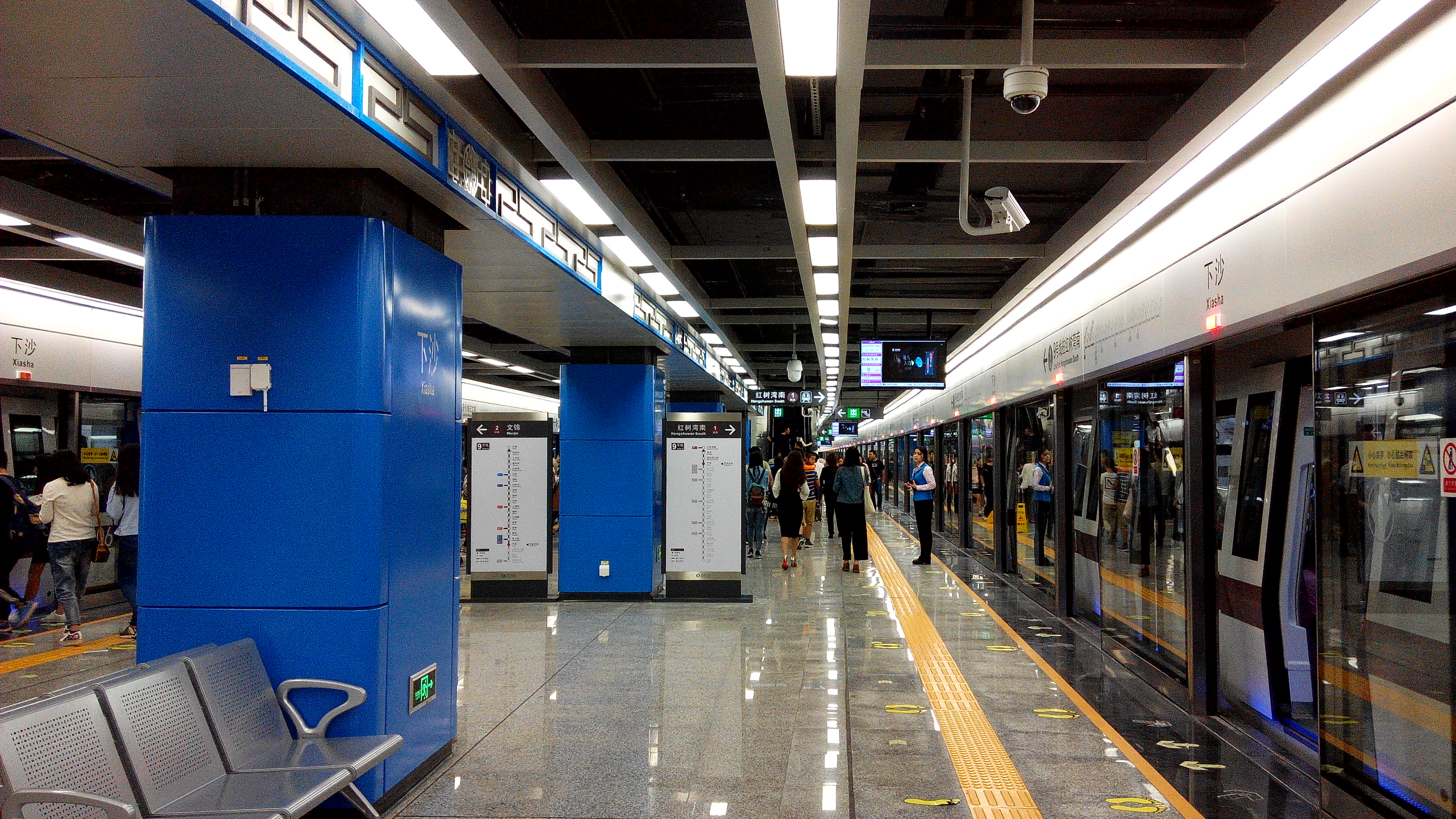 深圳地铁9号线 下沙站站台